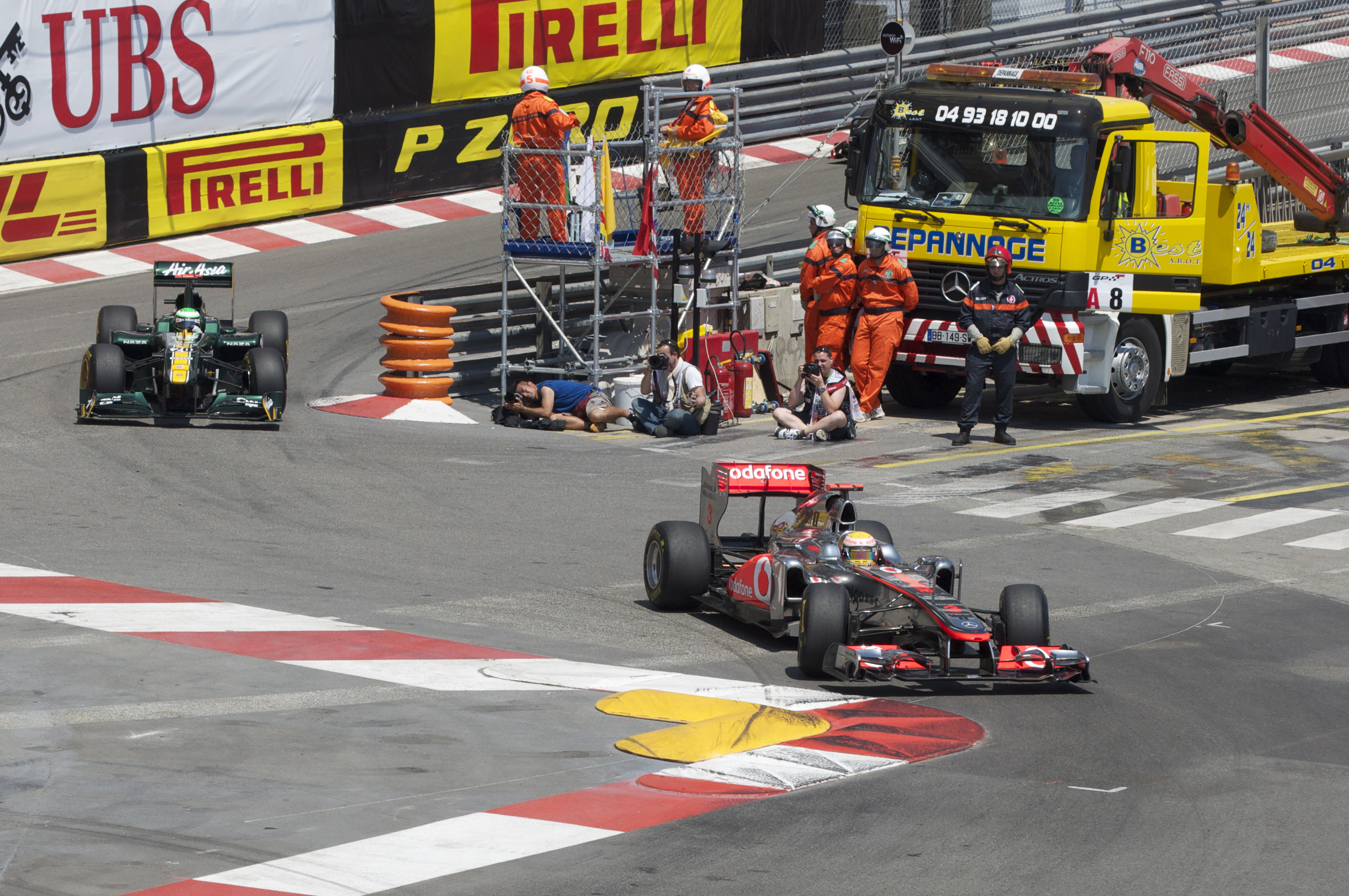 2011 Monaco GP